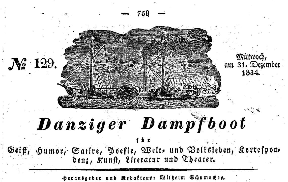 Logo Danziger Dampfboot